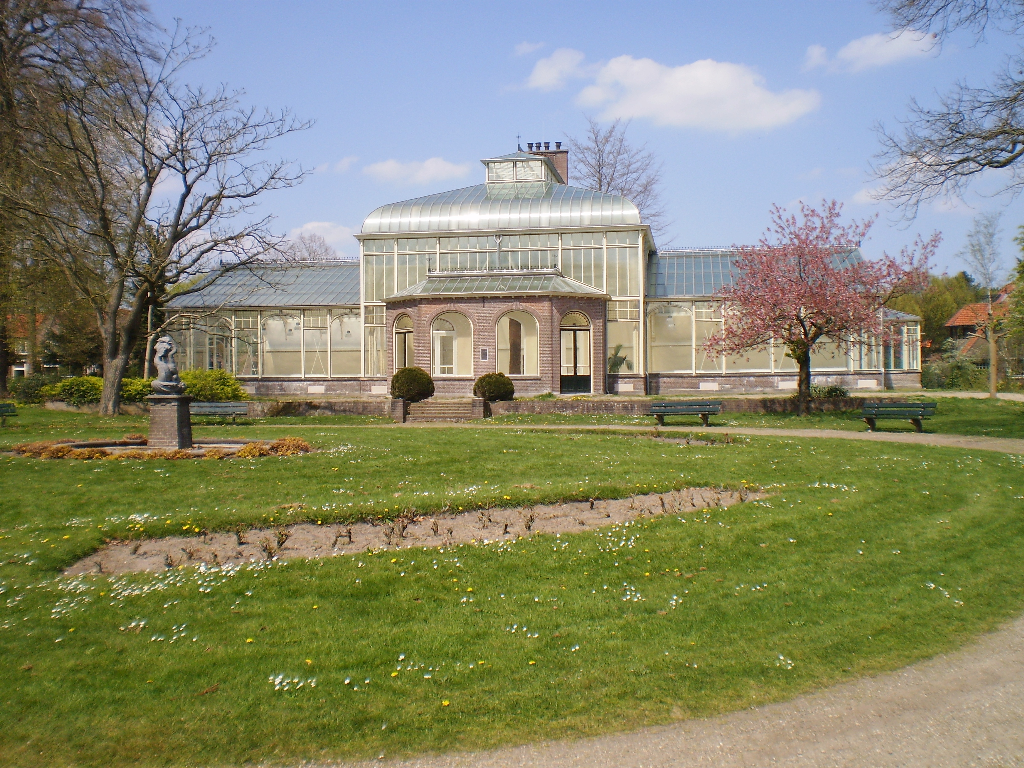 Met zicht op het zuiden vangt de kas zoveel mogelijk licht. De kast staat op 1 mei 2013 leeg